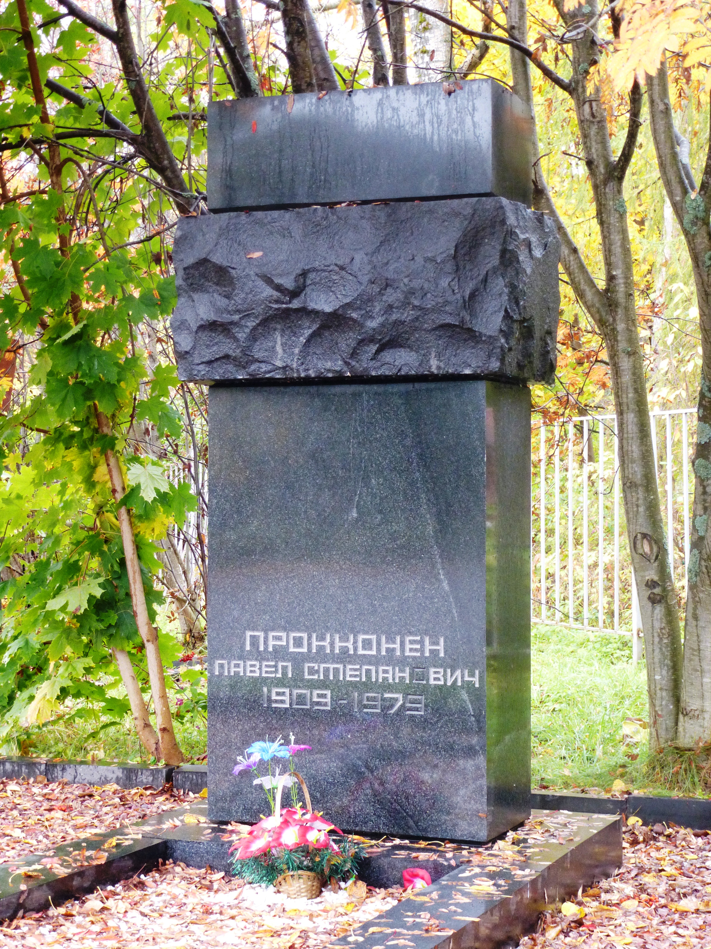 Памятник на могиле Прокконена П.С - председателя Президиума Верховного Совета Карельской АССР на Сулажгорском мемориальном городском кладбище в Петрозаводске.